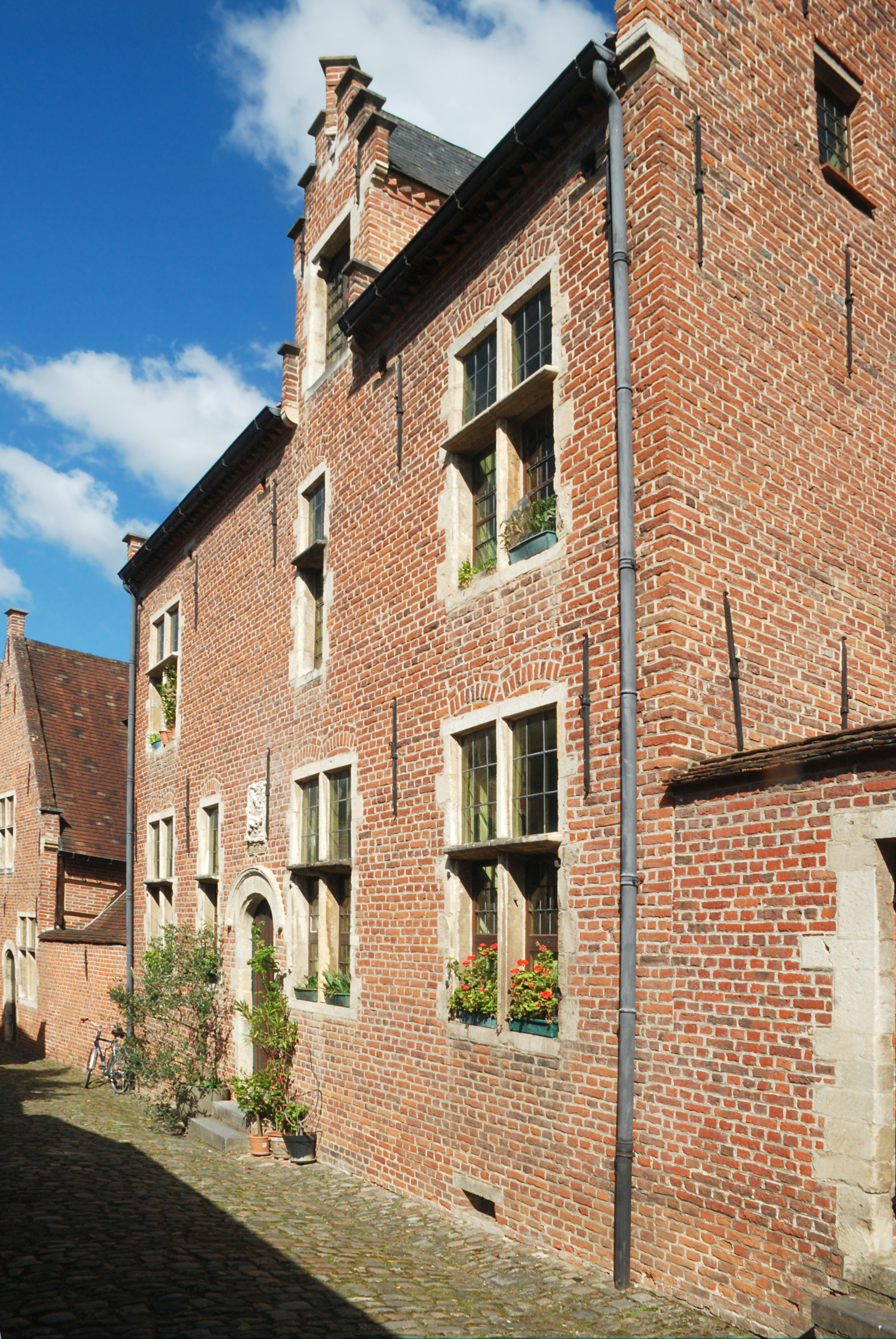 Belgium - Leuven - Groot Begijnhof - Klein Straatken n° 69 - maison « Cas van Waver »